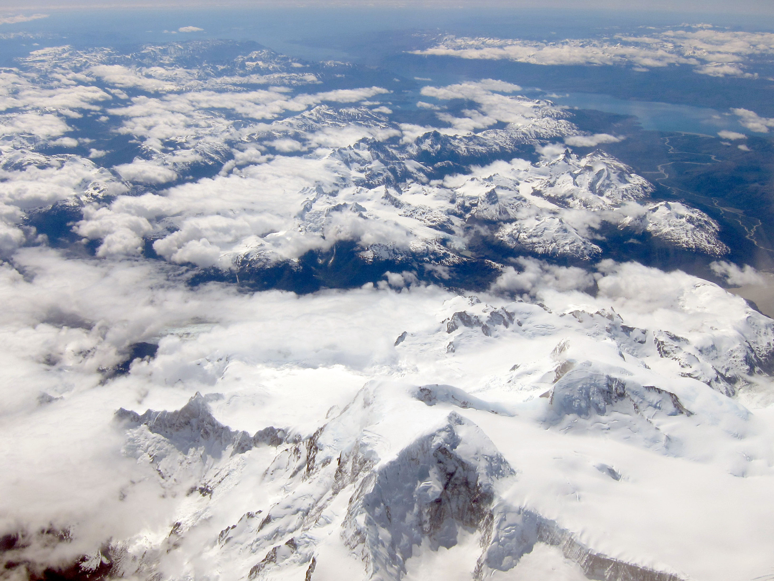 Monte San Valentín, Chile.